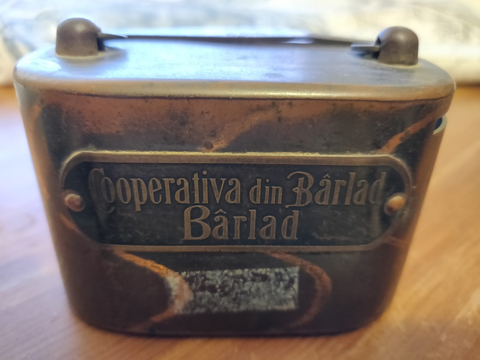 Cutie metalica pentru bani - Cooperative din Bârlad